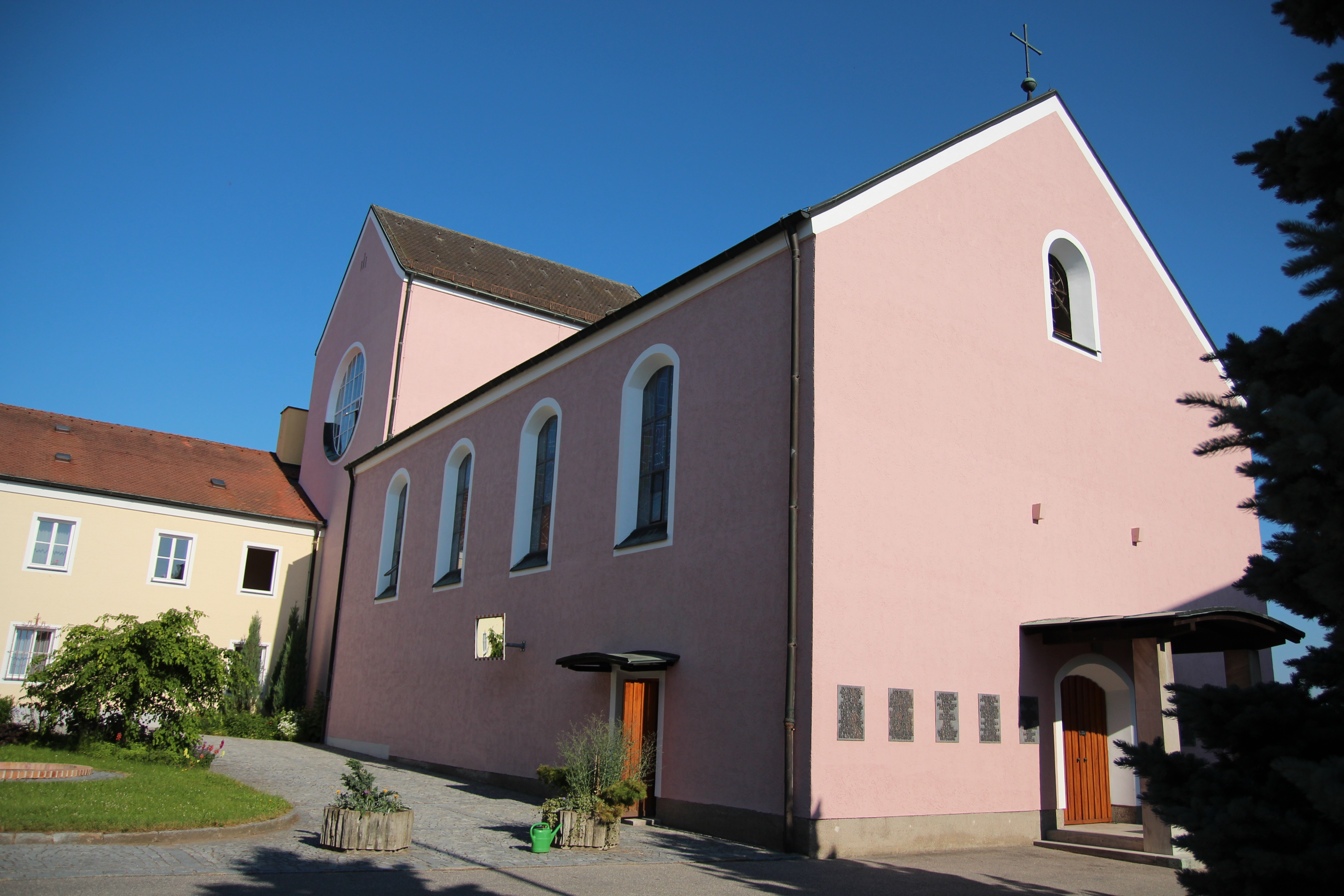 Klosterkirche Aiterhofen aussen